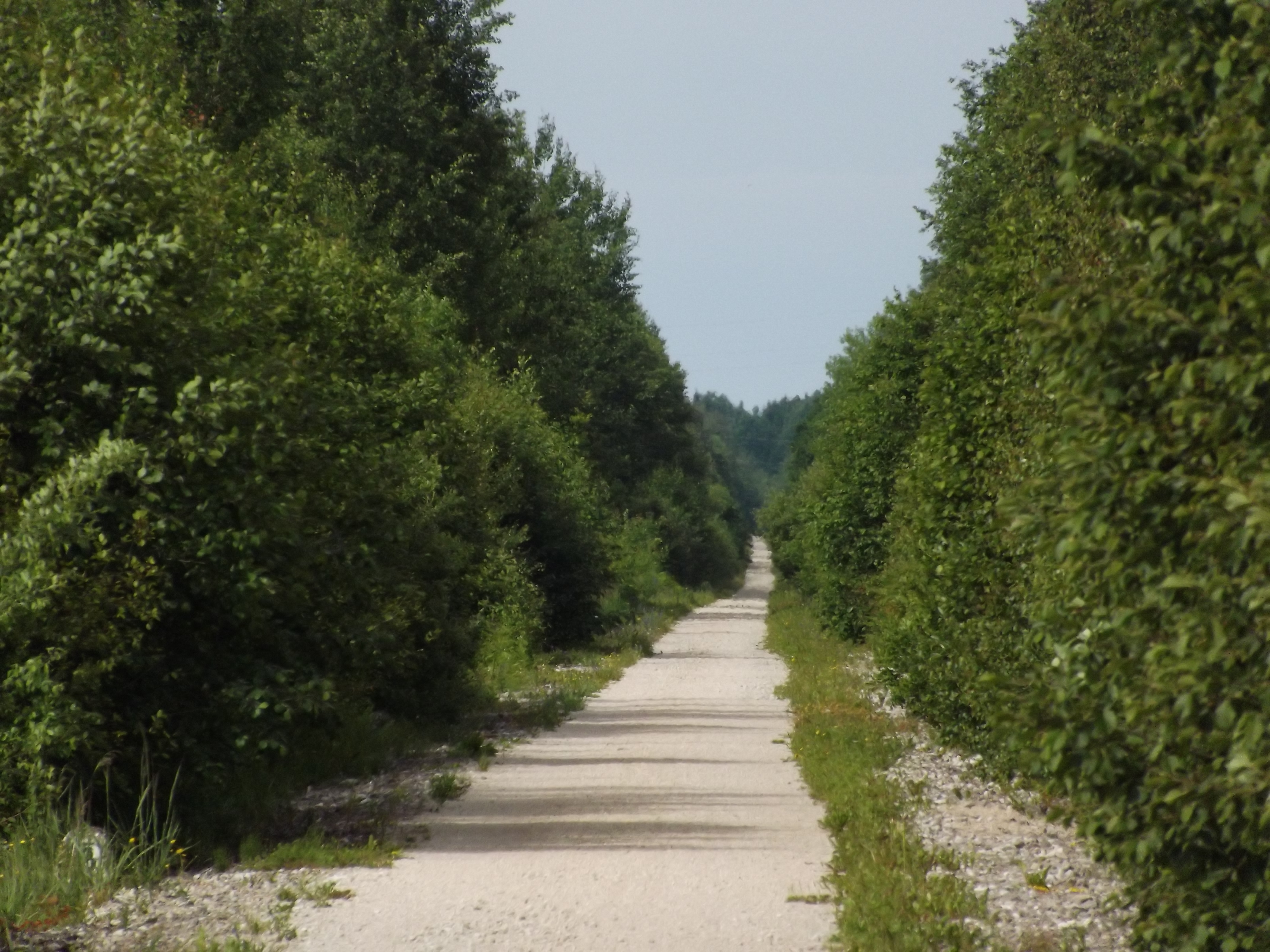 Endine raudteetamm Turba-Ellamaa vahel, praegune Läänemaa Tervisetee.